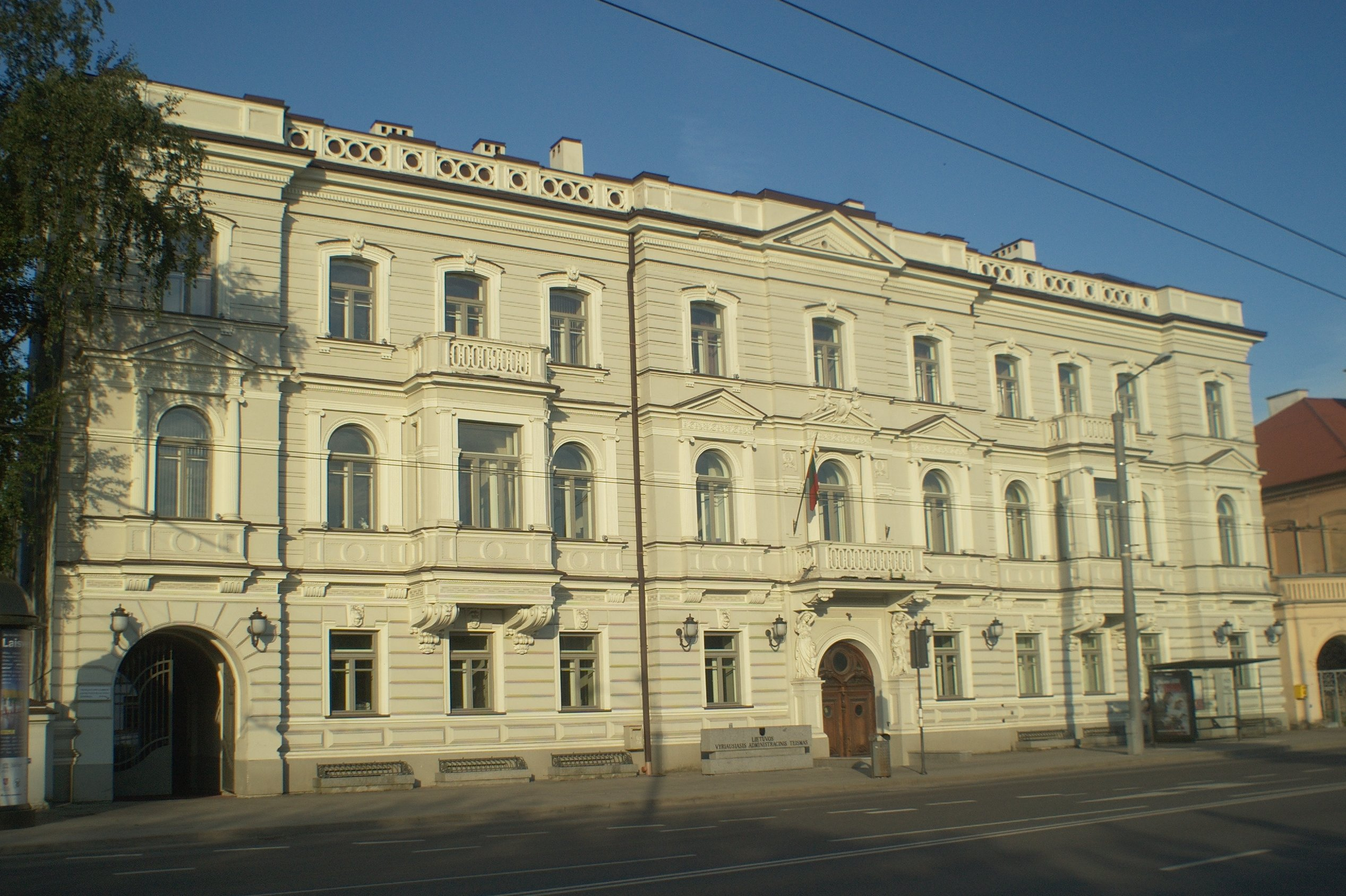 Lietuvos vyriausiasis administracinis teismas